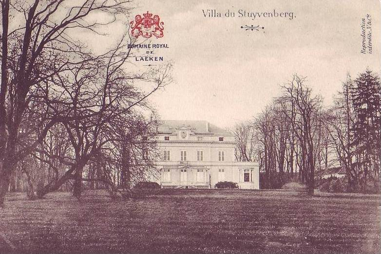 la Villa Stuyvenberg à Laeken, dans le domaine royal vers 1901.